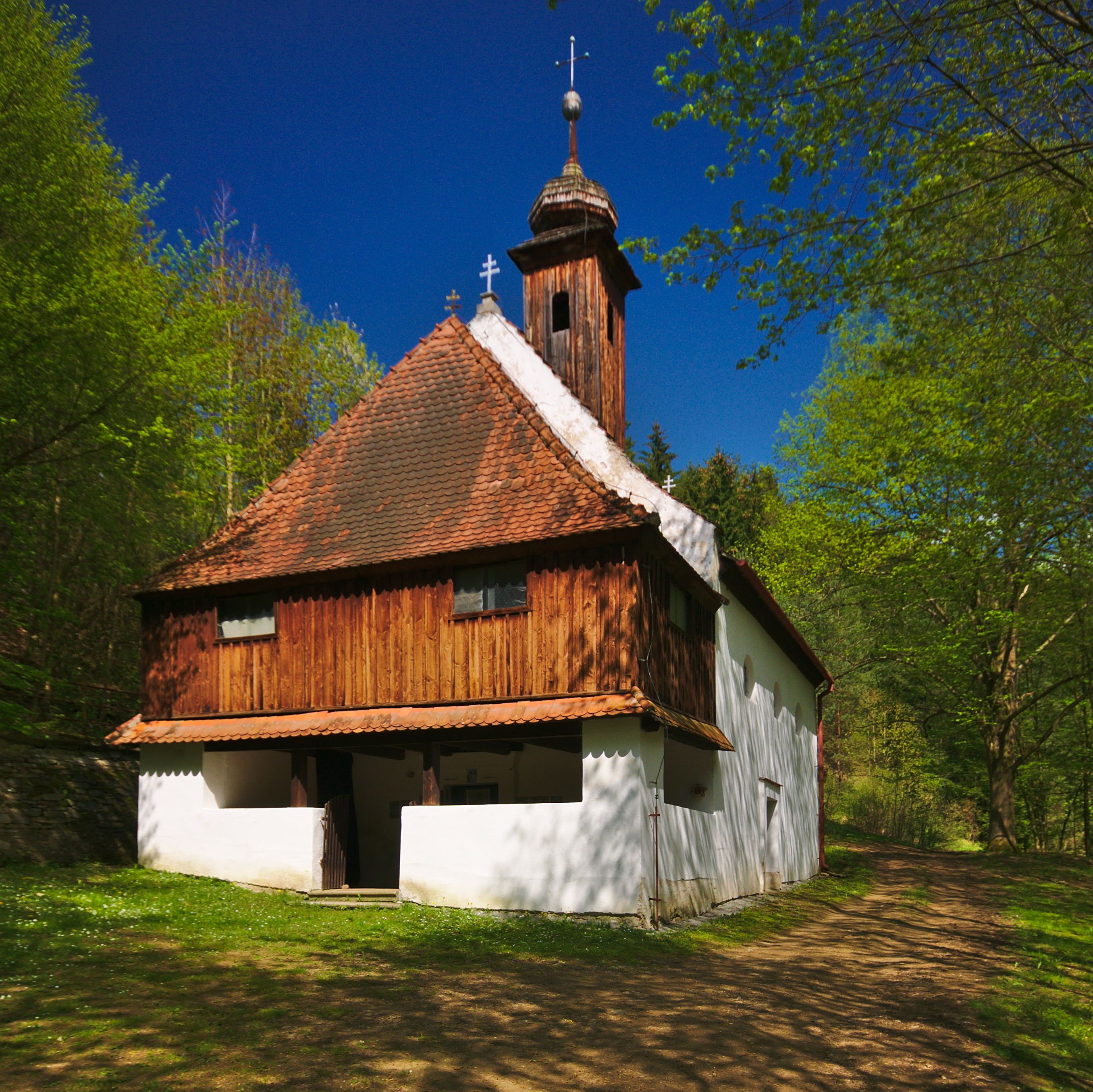 Kaple Nejsvětější Trojice, Švařec, Koroužné, okres Žďár nad Sázavou